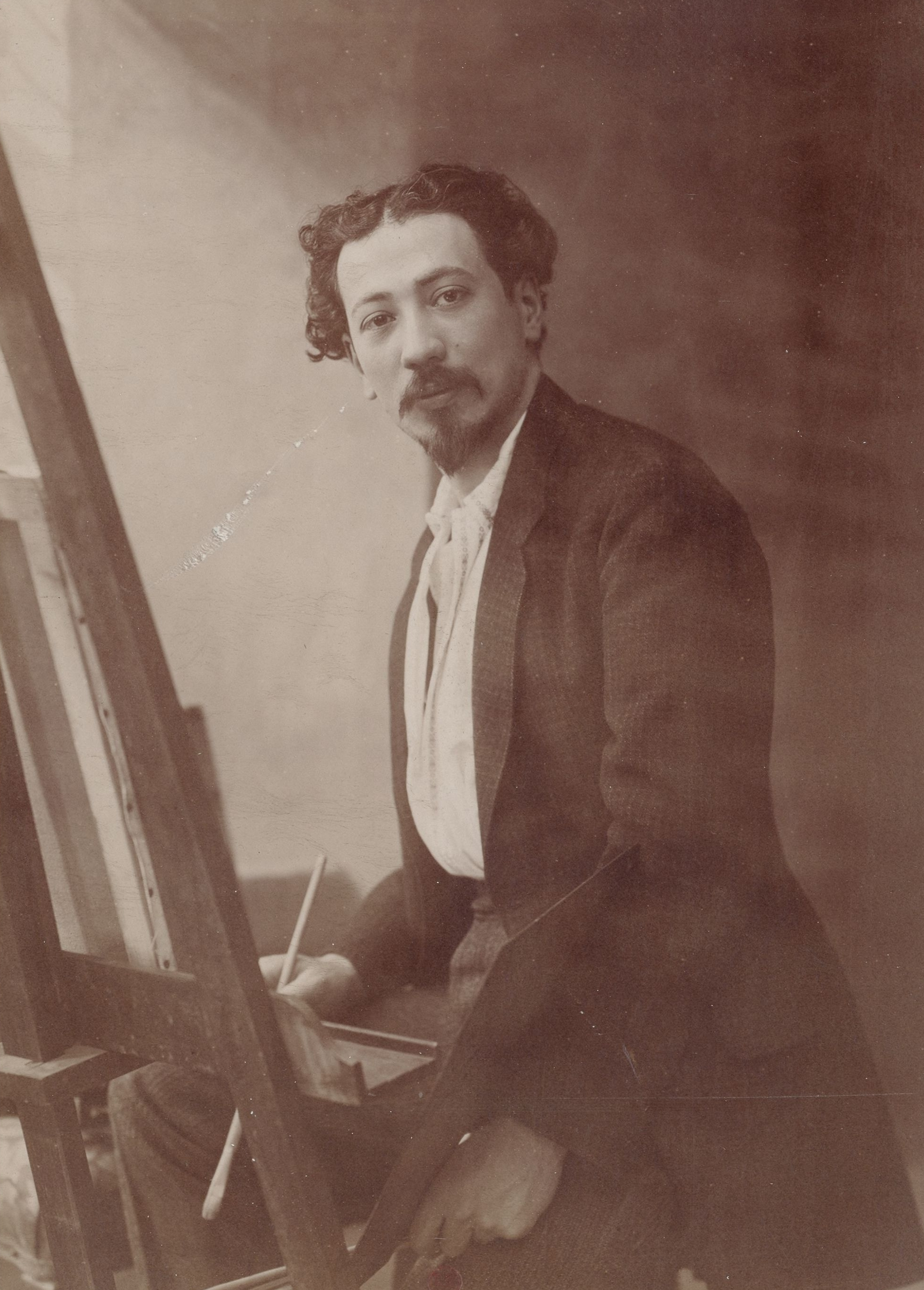 M. Caro-Delvaille, peintre.